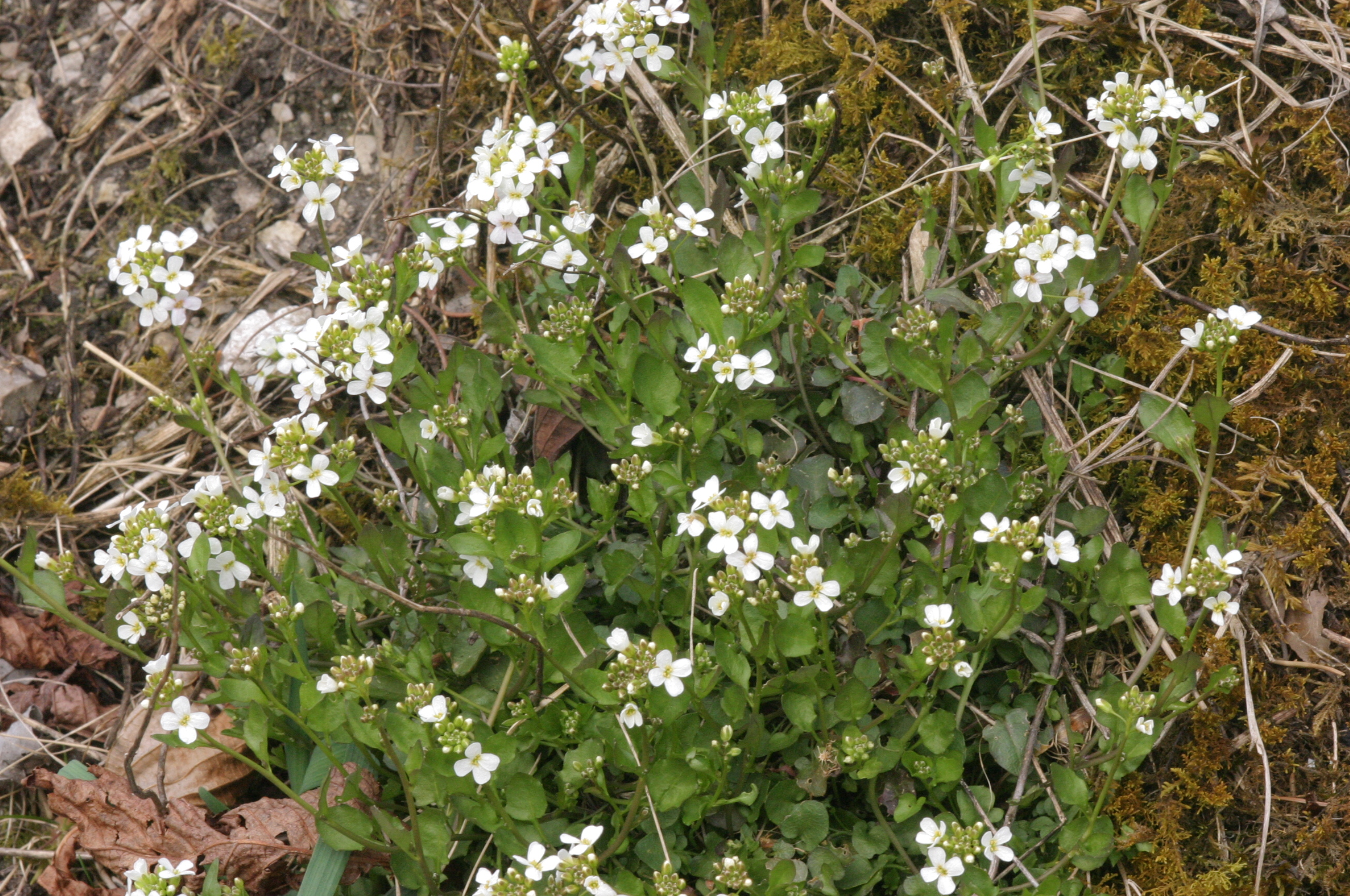 Arabidopsis halleri (Kriech-Schaumkresse) Aufnahmeort: bei Hollenstein an der Ybbs, Niederösterreich, Austria